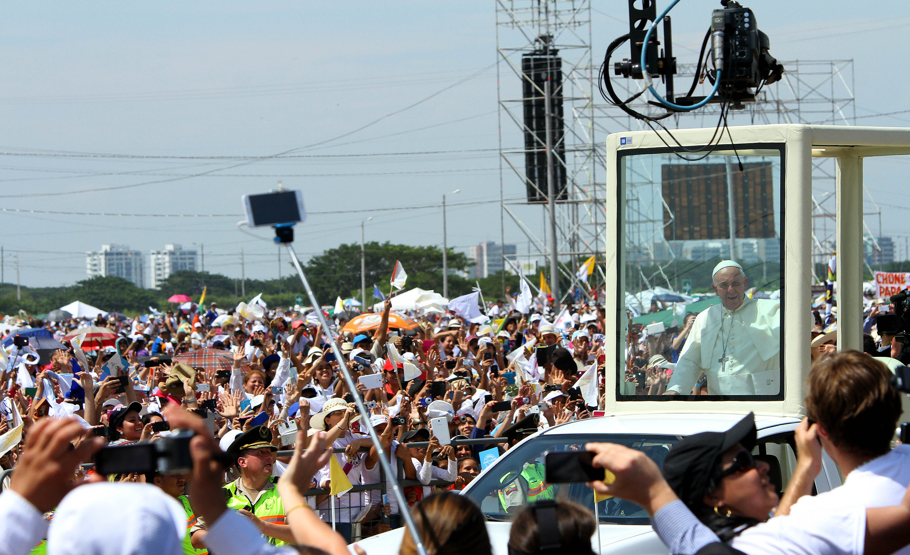 Guayaquil, 06 de jul del 2015 (Andes).-El papa Francisco I recorre el campus eucarístico en Samanes prevío a oficiar misa campal Foto:César Muñoz/Andes